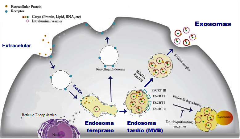 Figura 1. Biogénesis del Exosoma y secreción dentro del sistema endosomal. Los endosomas tempranos (EE) se forman por la fusión de vesículas endocíticas. Dos vías mostradas por los EE: regresar a la membrana plasmática o su conversión a endosomas tardío LE/MVB a través de la brotación hacia el interior de la membrana, que empaqueta las cargas en vesículas intraluminales ILV.